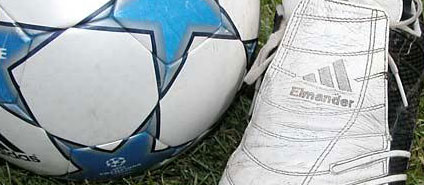 Johan Elmanders specialstøvle. .